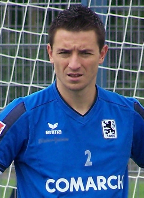 Ænglisc: Antonio Rukavina, 1860 München, Training Grünwalder Straße